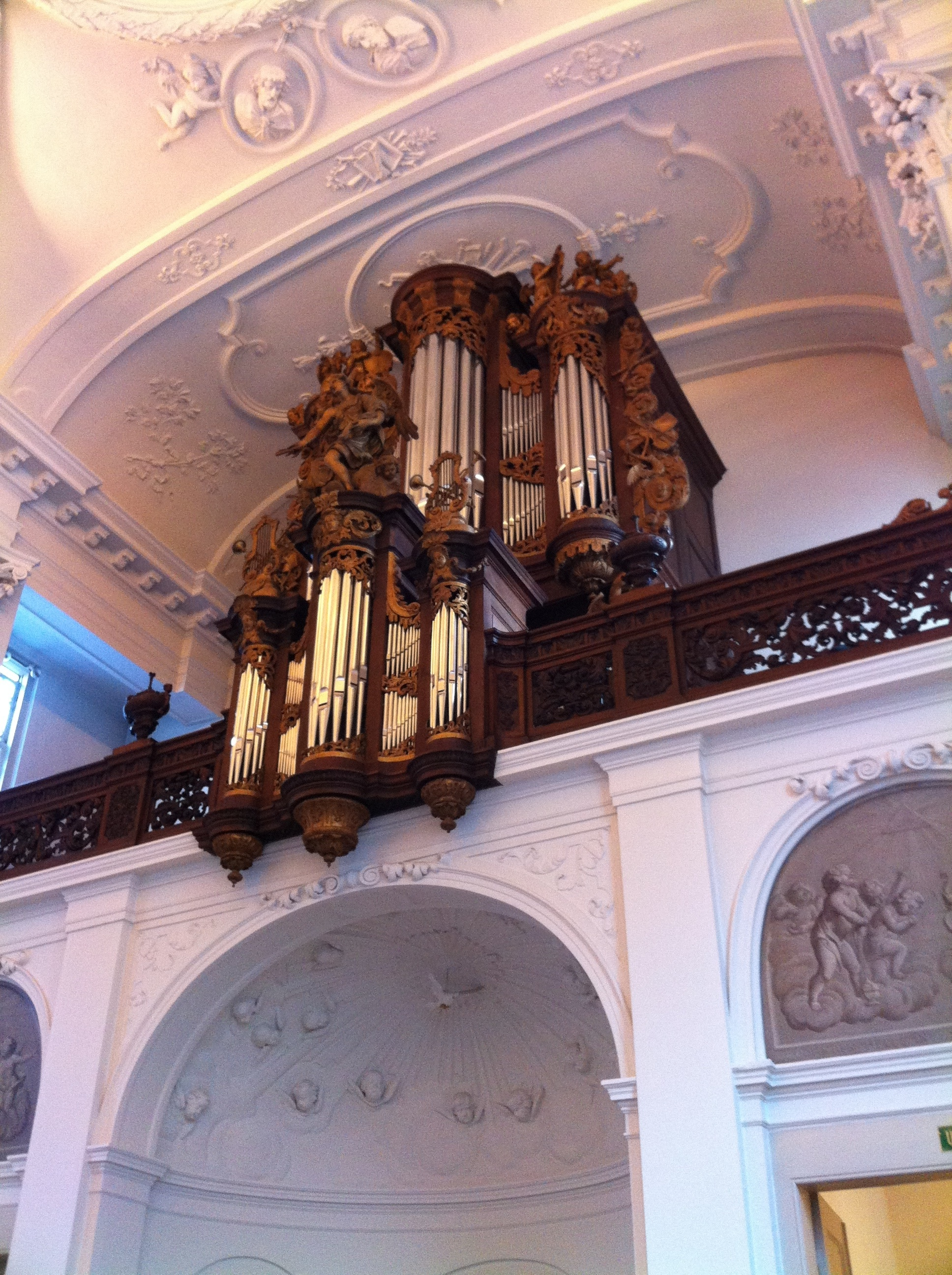 Garrels orgel in de Oud-Kath. Kerk v.d. H. Augustinus 's-Gravenhage